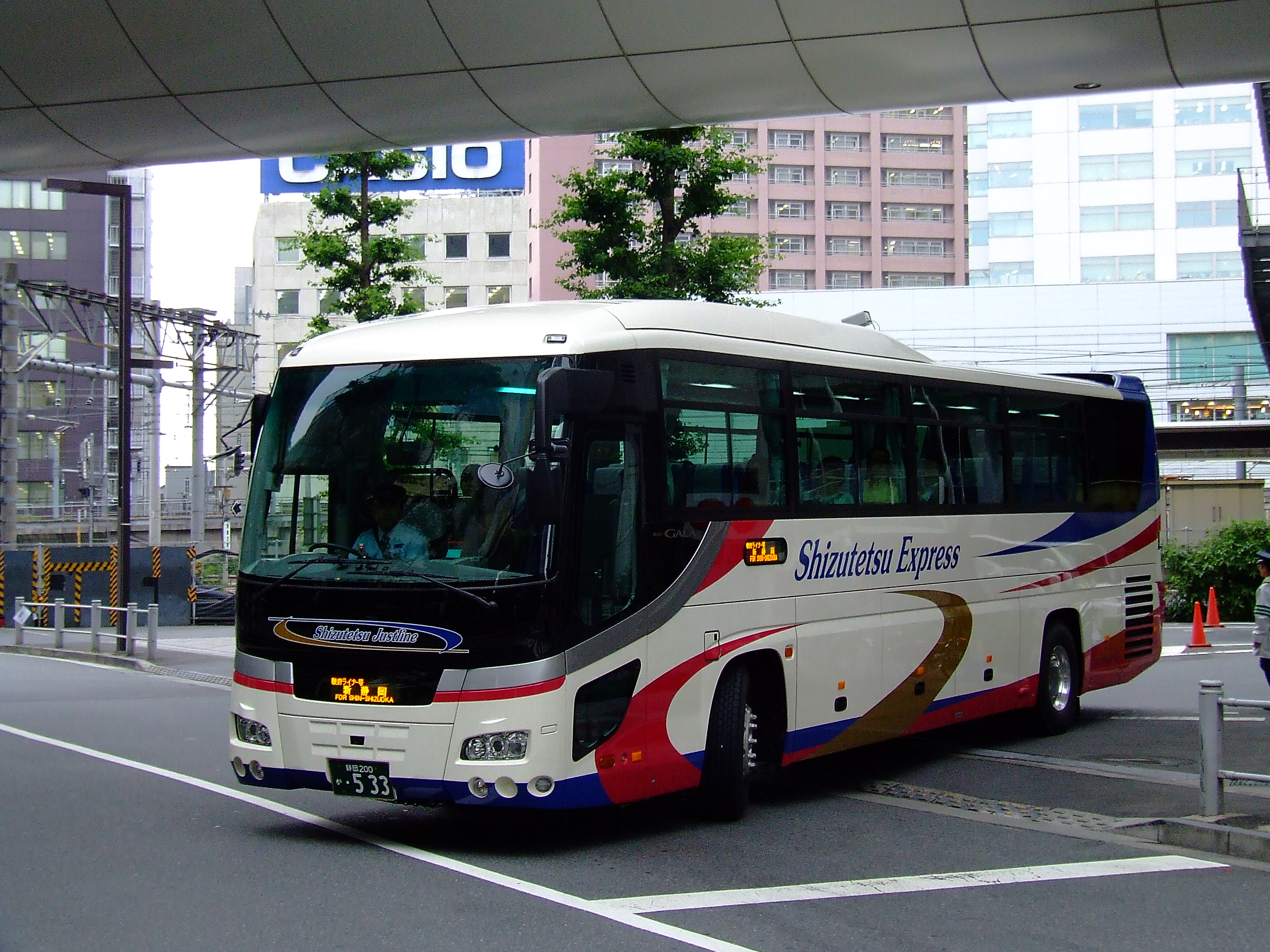 しずてつジャストライン高速バス新宿～新静岡線「駿府ライナー」新宿駅付近にて